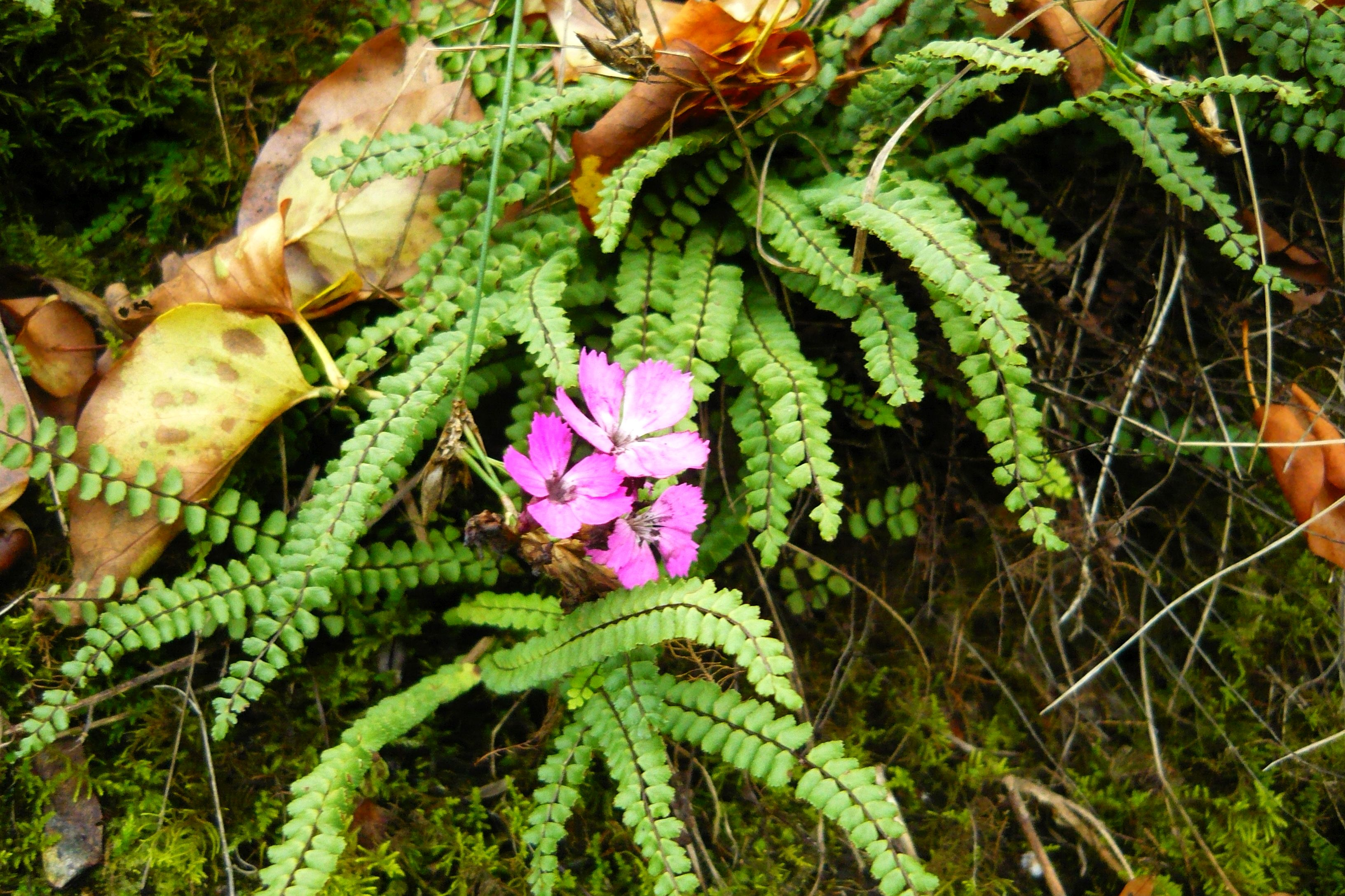 Vegetace západního zastíněného svahu přírodní památky Pod Žvahovem